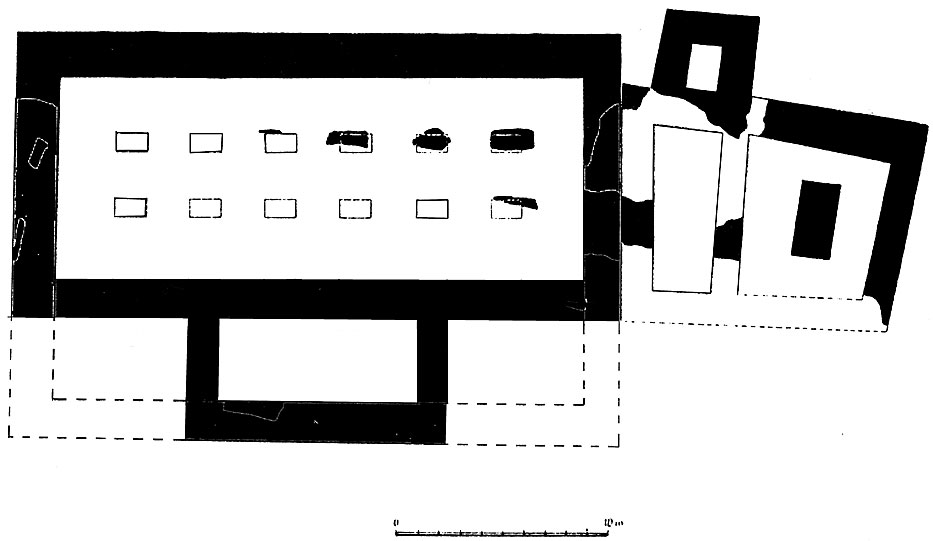 Rzut palatium wawelskiego z XI wieku z aneksem południowym wg K. Stali. Oprac. A. Szkiłondź Plan of the Wawel palatium XI th century with the south annexe acc. to K. Stala. Made by A. Szkiłondź